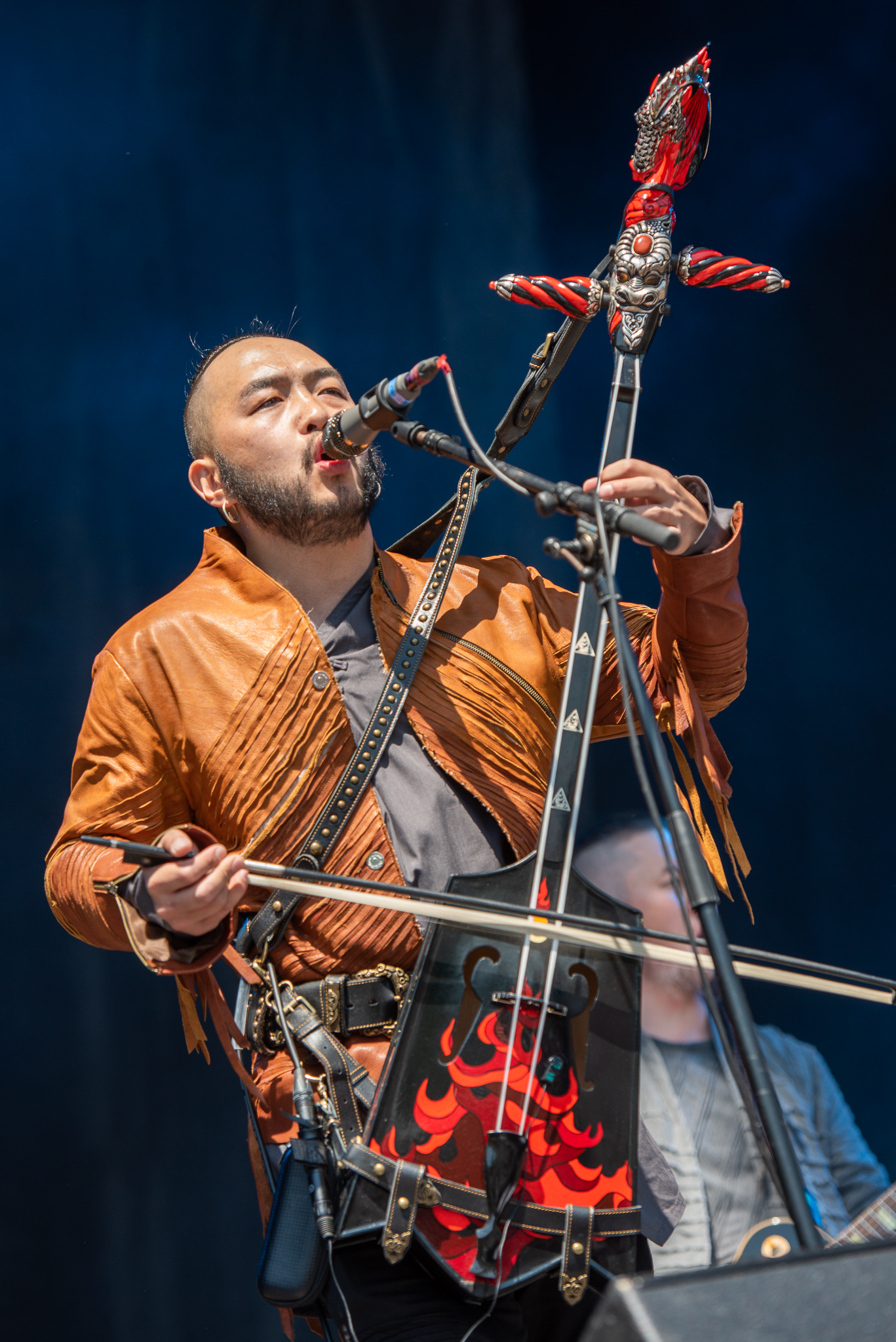 ARGO-Konzerte,Beck's Park Stage,Konzert,Livekonzert,Livemusik,Musik,RiP,Rock im Park 2019,The Hu